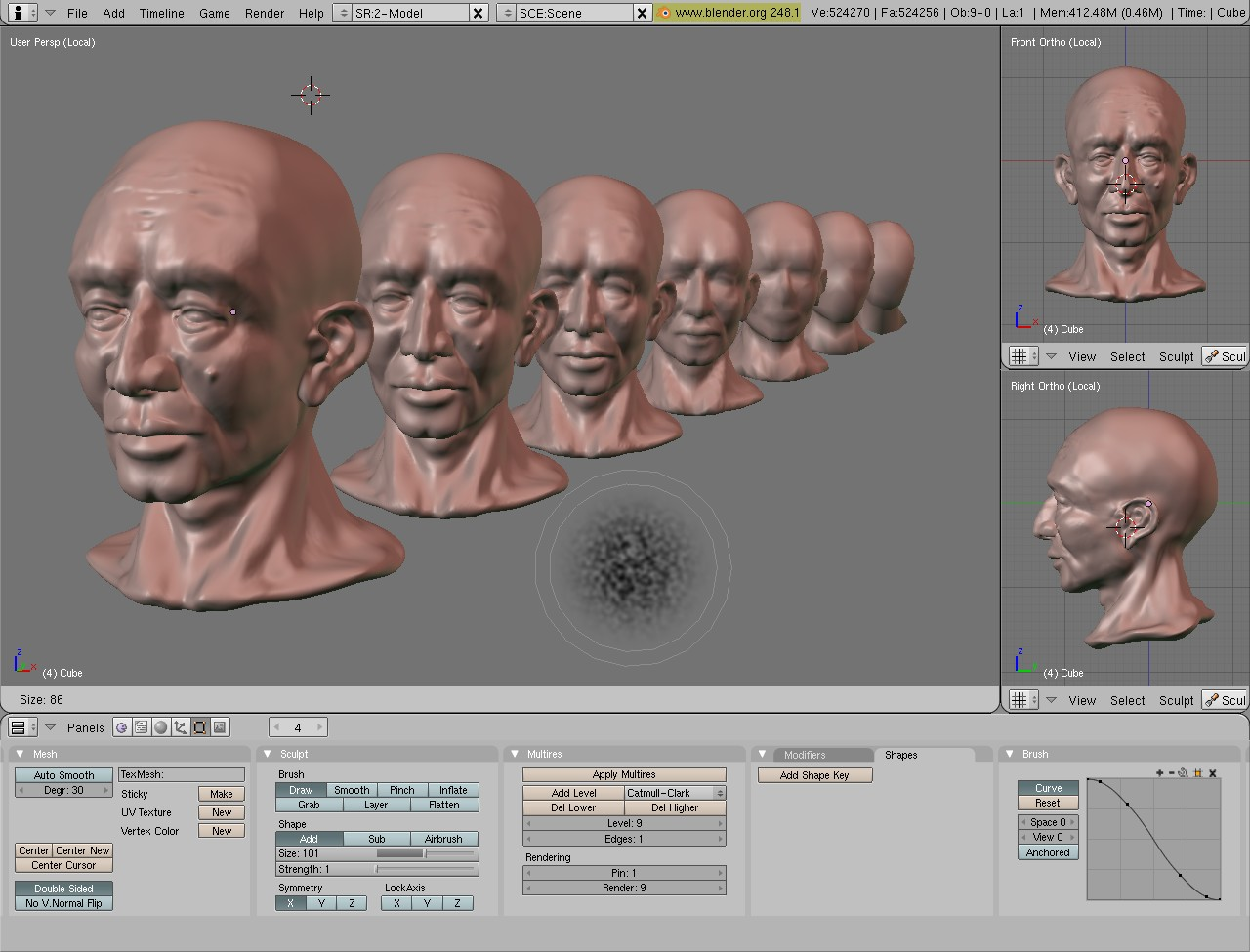 ภาพนี้มี 2 สัญญาอนุญาต ส่วนที่ไม่ใช่ User Interface เป็น สาธารณสมบัติ ส่วนที่เป็น User Interface ใช้ GPL รุ่น 2 ขึ้นไป This work is free software; you can redistribute it and/or modify it under the terms of the GNU General Public License as published by the Free Software Foundation; either version 2 of the License, or any later version. This work is distributed in the hope that it will be useful, but without any warranty; without even the implied warranty of merchantability or fitness for a particular purpose. See version 2 and version 3 of the GNU General Public License for more details.